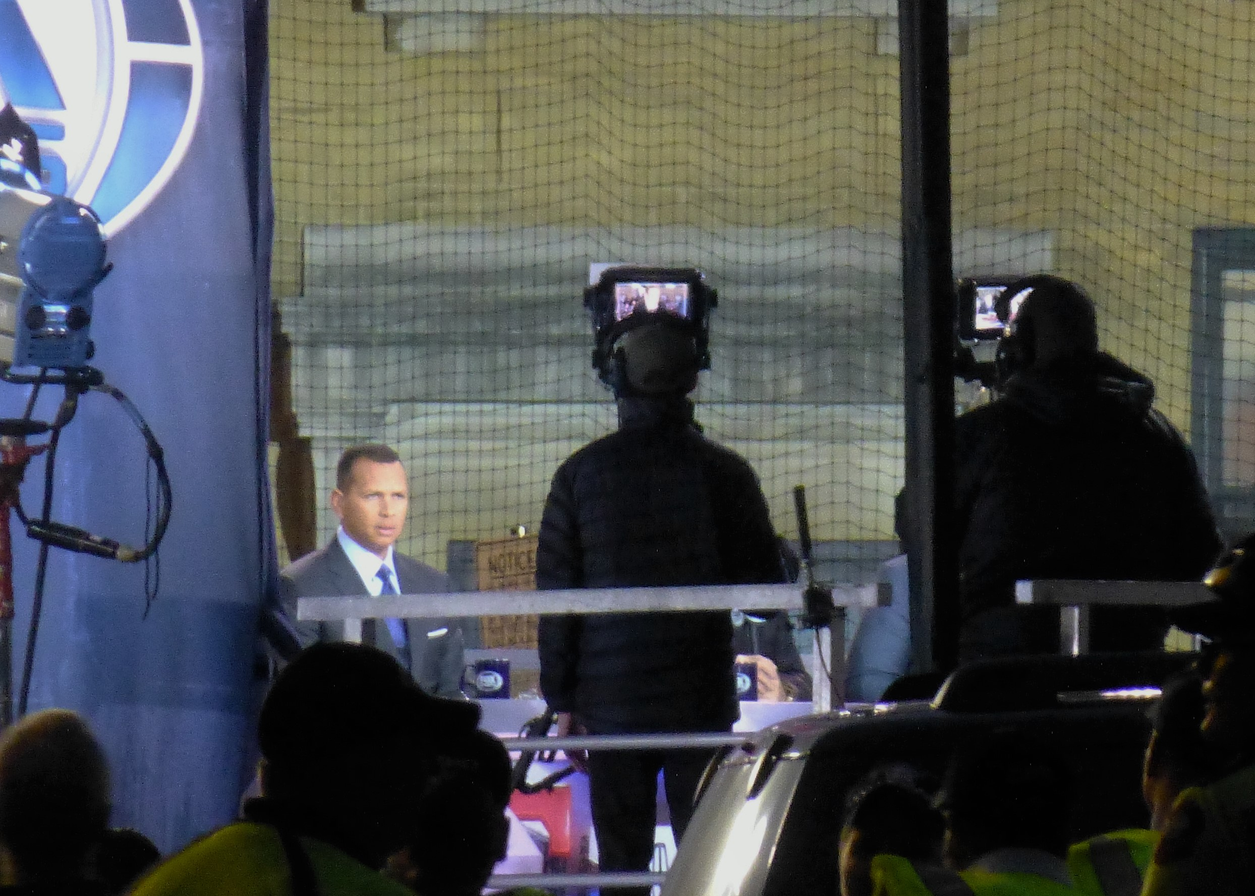 Alex Rodriguez